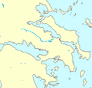 Ποταμός Κηφισός